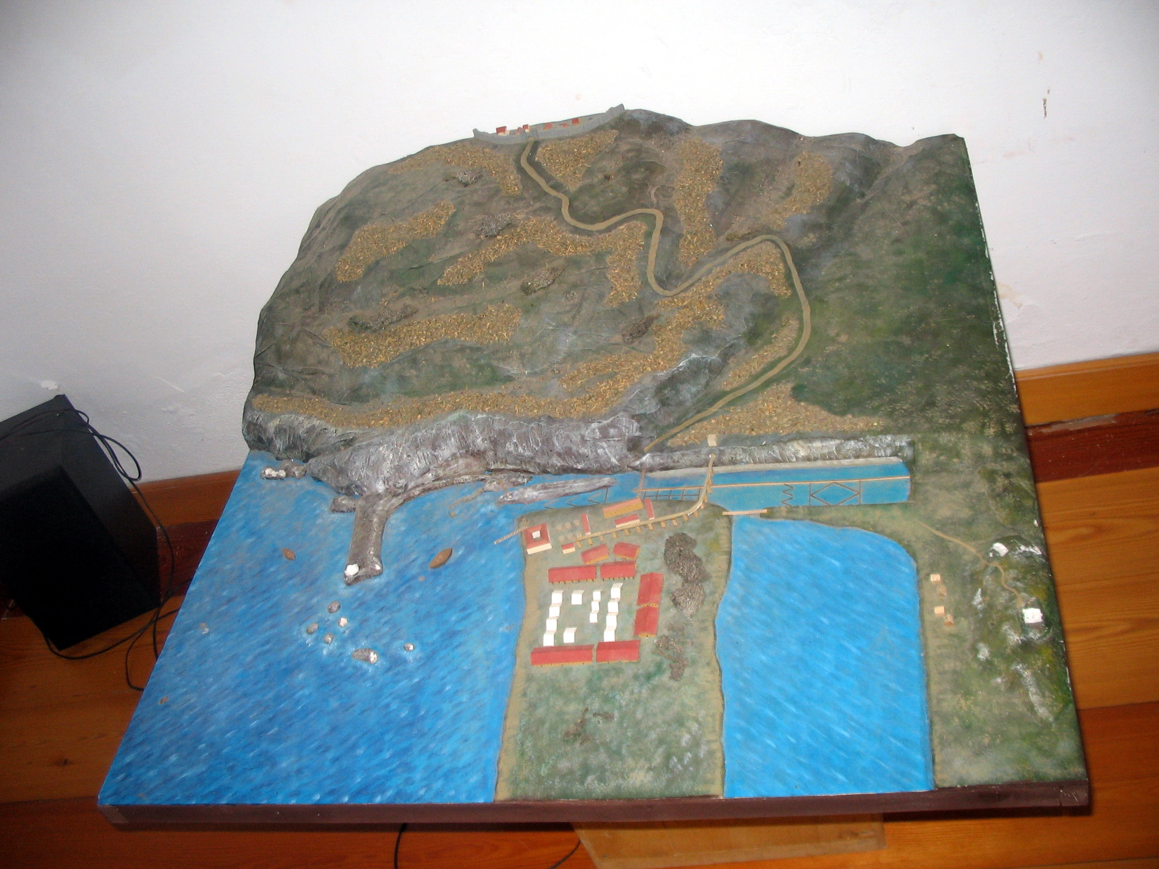 Museo di Cosa - Ansedonia - Orbetello - Toscana - Italia